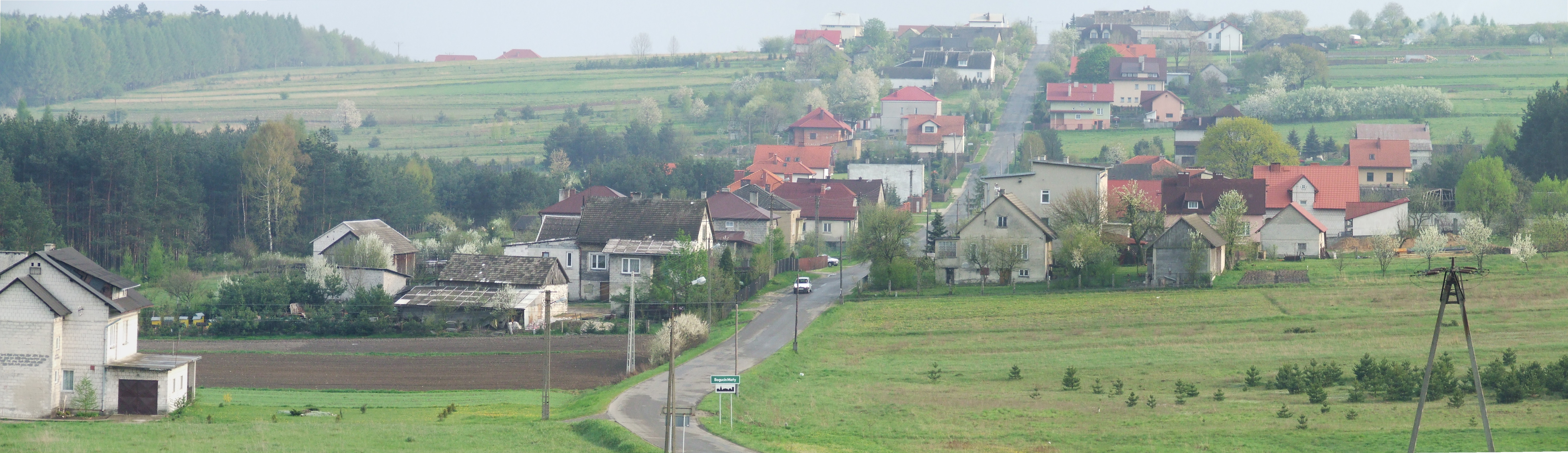 Bogucin Mały - panorama wsi